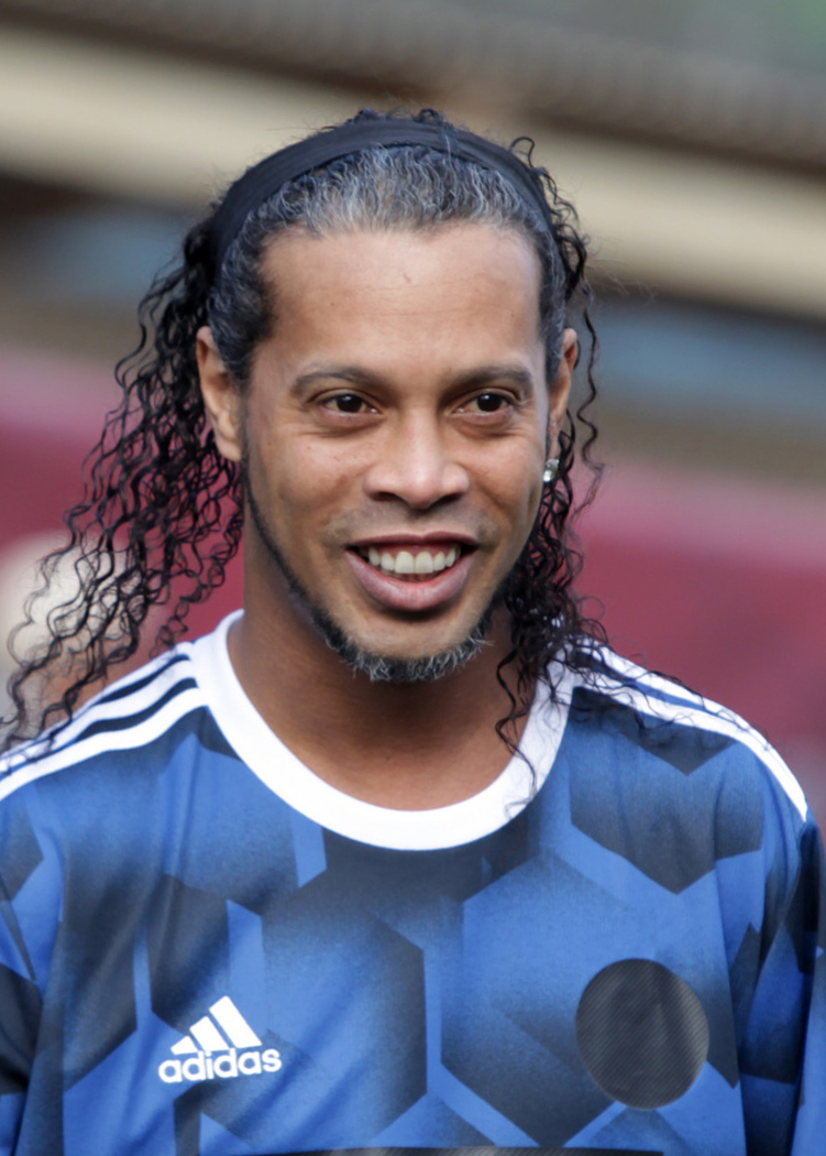 Легенды мирового футбола - Легенды сборной России